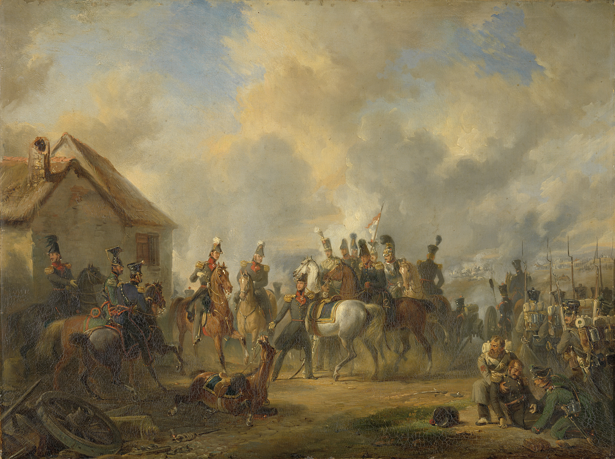 De slag bij Boutersem, 12 augustus 1831, gedurende de Tiendaagse Veldtocht. De staf van de prins van Oranje bestaande uit bereden officieren verzameld voor een boerenhuis. In het midden staat de prins naast zijn paard dat gewond is geraakt, naast de prins majoor Hoyel. Rechts soldaten van de infanterie en een gewonde officier. In het verschiet het slagveld.; Nicolaas Pieneman (1809-1860), olieverf op doek, 1833